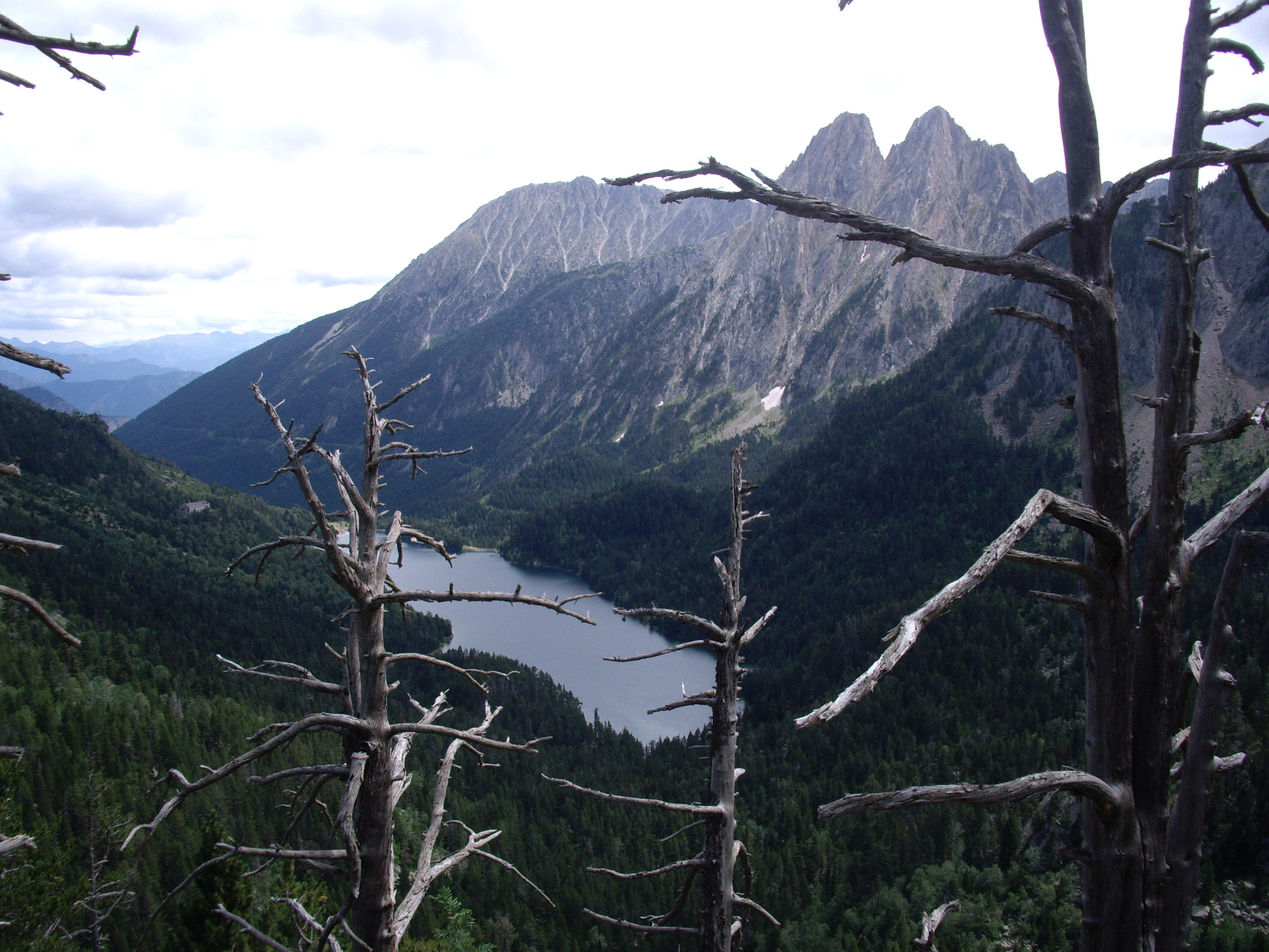 Sant Maurici i Els Encantats des del mirador de Portarró